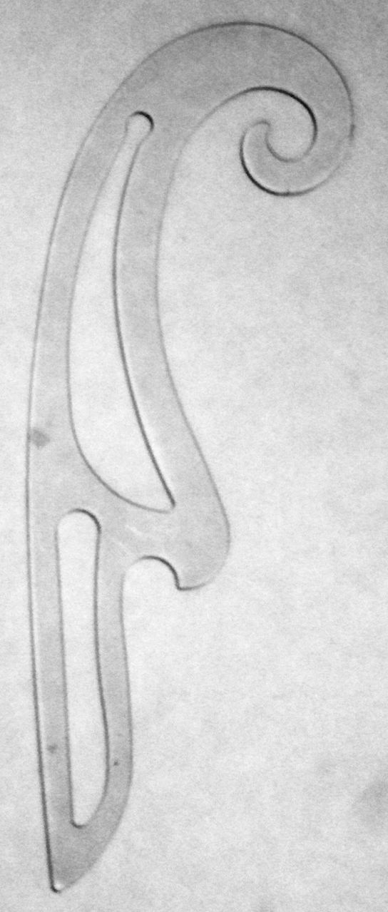 Perroquet ou pistolet à dessin : utilisé pour tracer des courbes